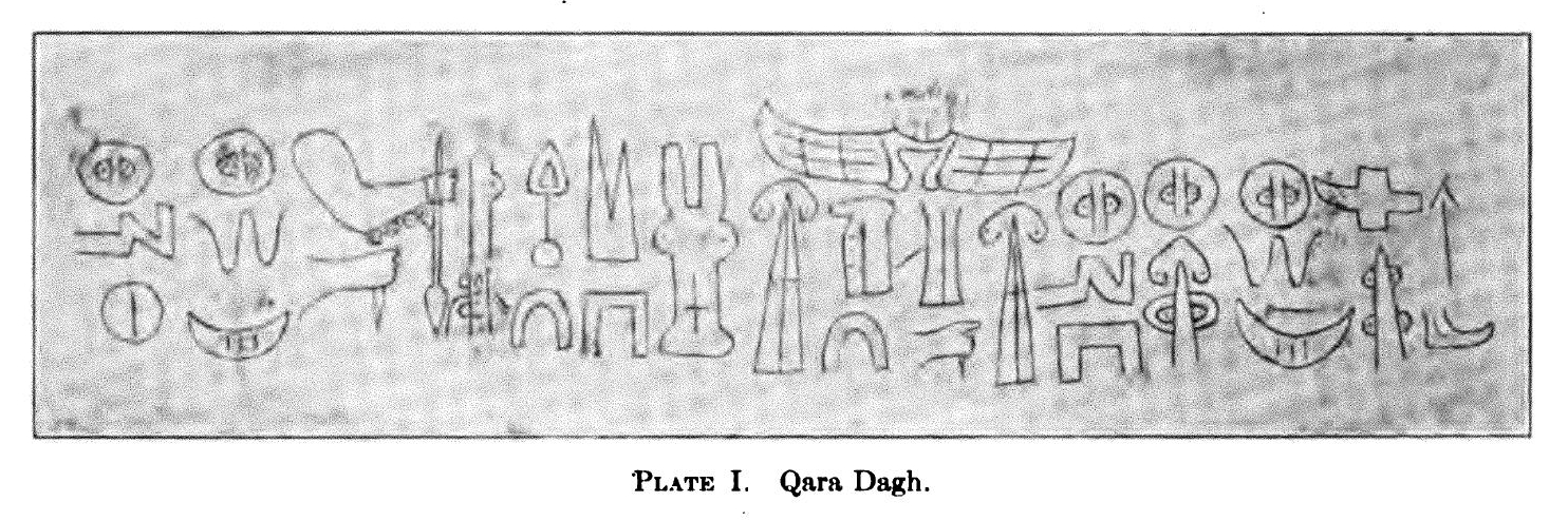 Inschrift Karadağ 1 am Vulkan Karadağ in der Südtürkei, Umzeichnung durch die Cornell Expedition